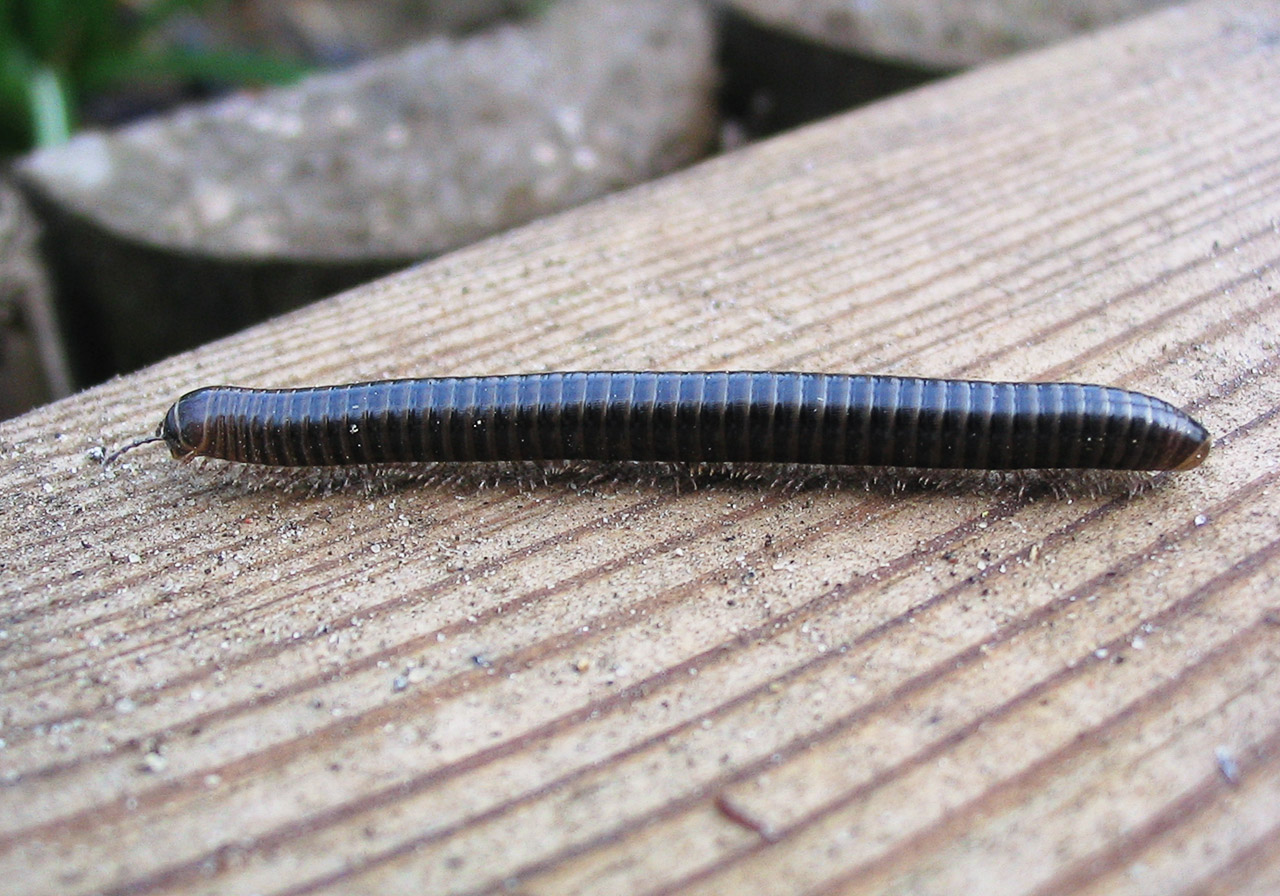 Beschreibung: Doppelfüßer / Cylindroiulus caeruleocinctus Fotograf: Darkone, 15. April 2005